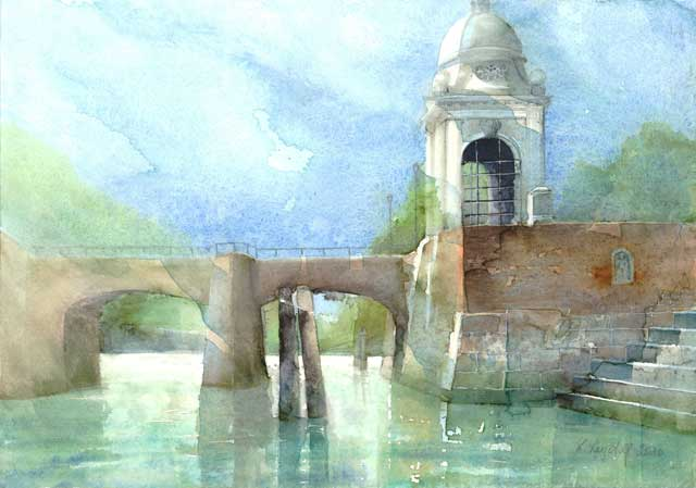 Padova - Brücke über den Piovego mit Zollstation. Aquarell 2010